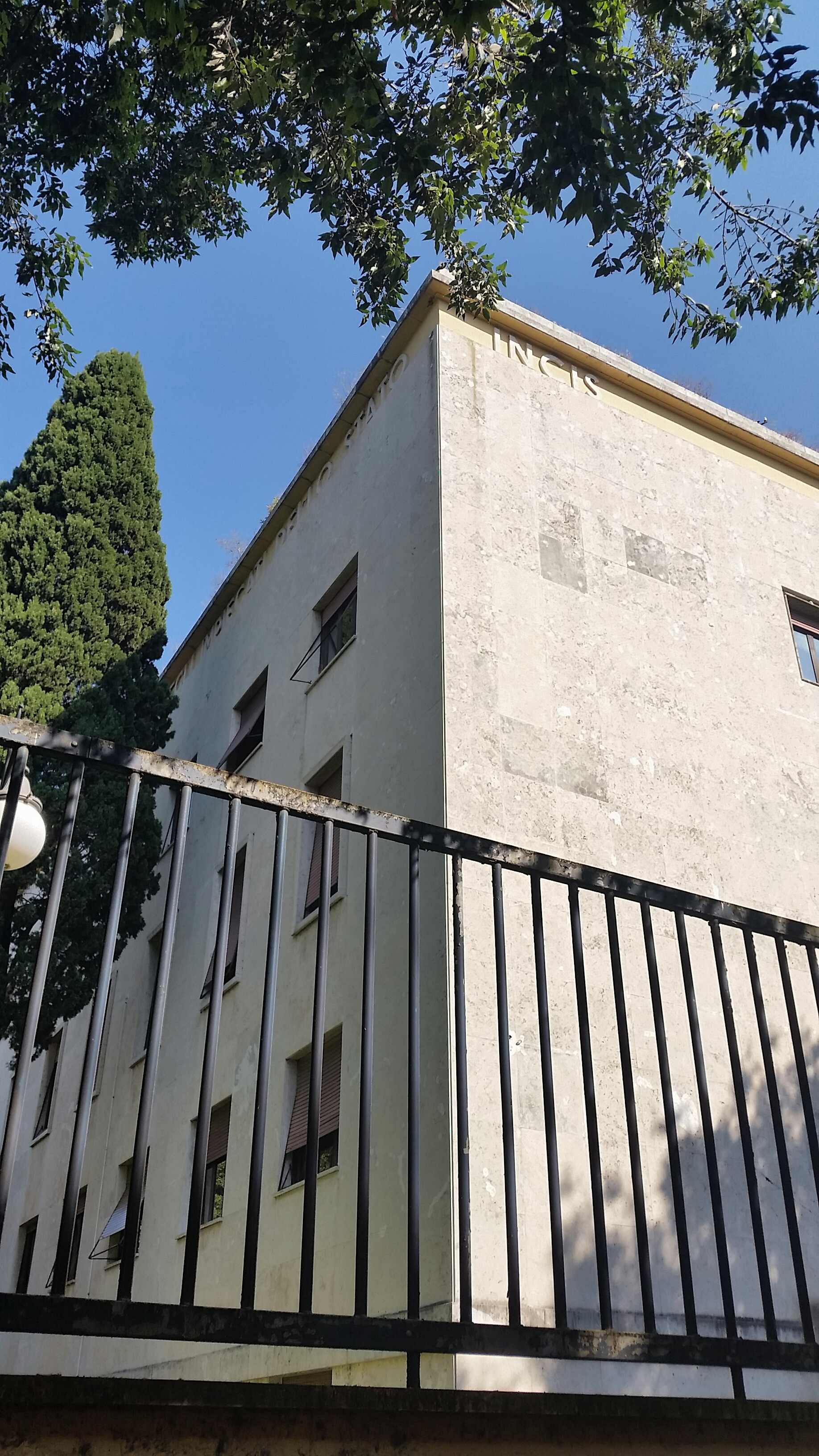 Sede INCIS a Via Lariana, 15, vista laterale.